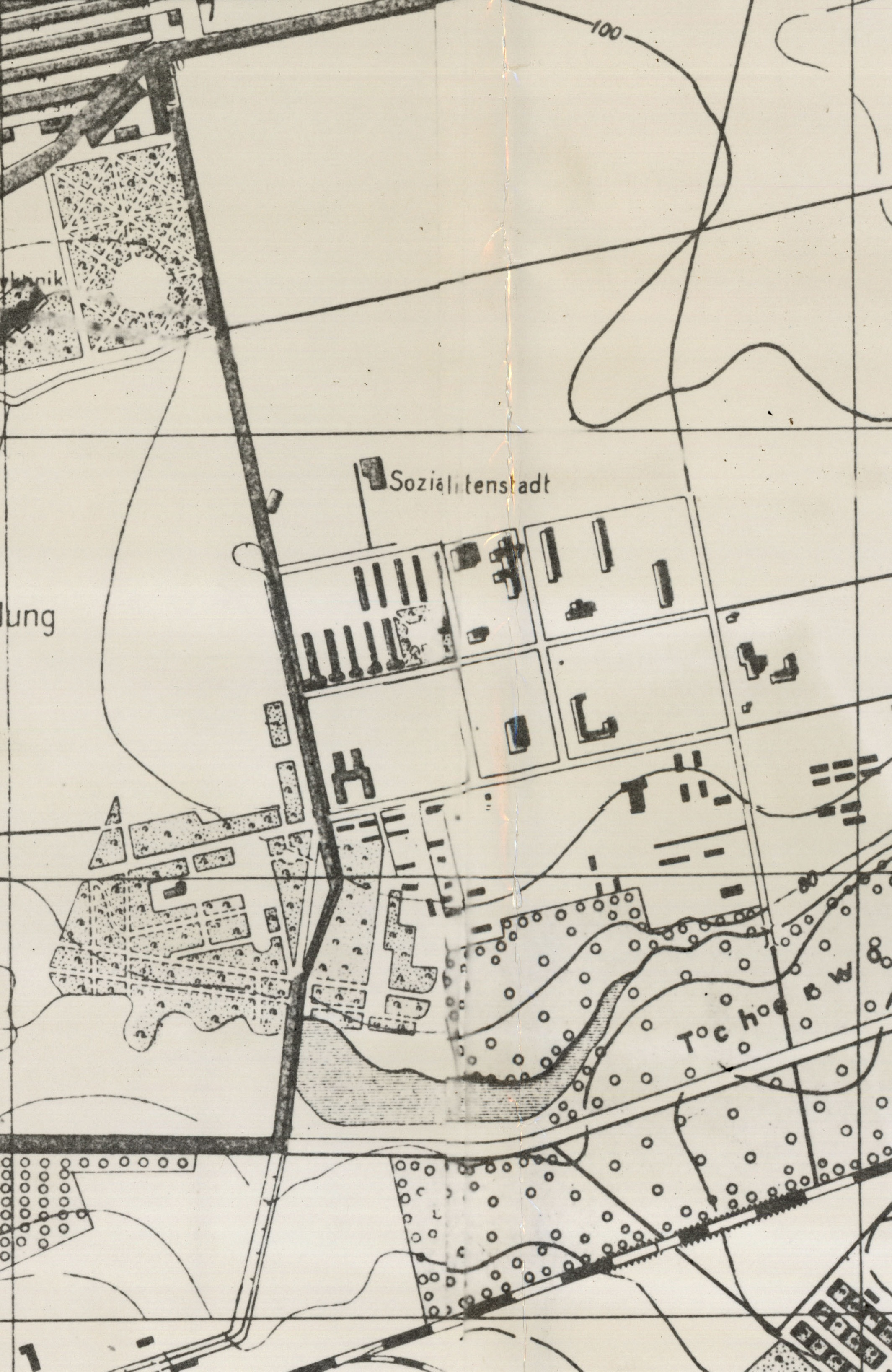 Проспект Металургів на фрагменті плану м. Кривий Ріг часів німецької окупації.